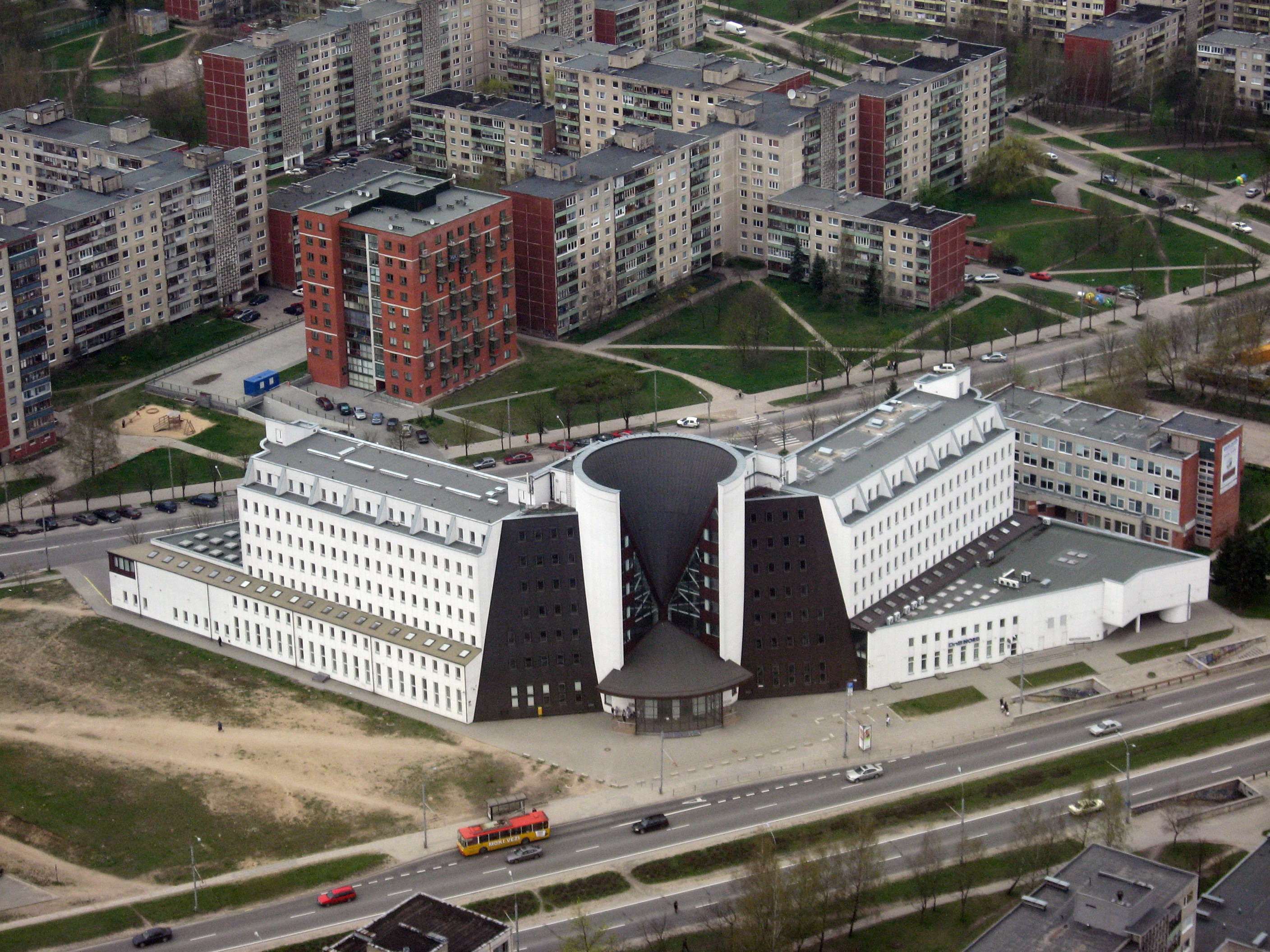 Výhled z Vilniuské televizní věže